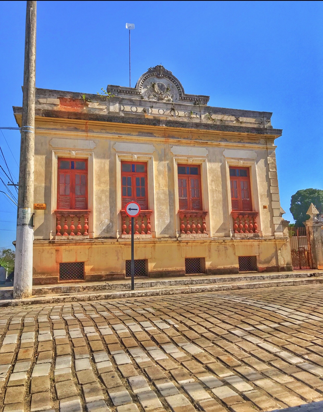 Este é o Antigo Casarão Da Familia Calmon do município de Linhares.